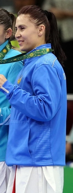 رزیتا علی‌پور در فینال مسابقات کاراته بازی‌های کشورهای اسلامی2017/باکو